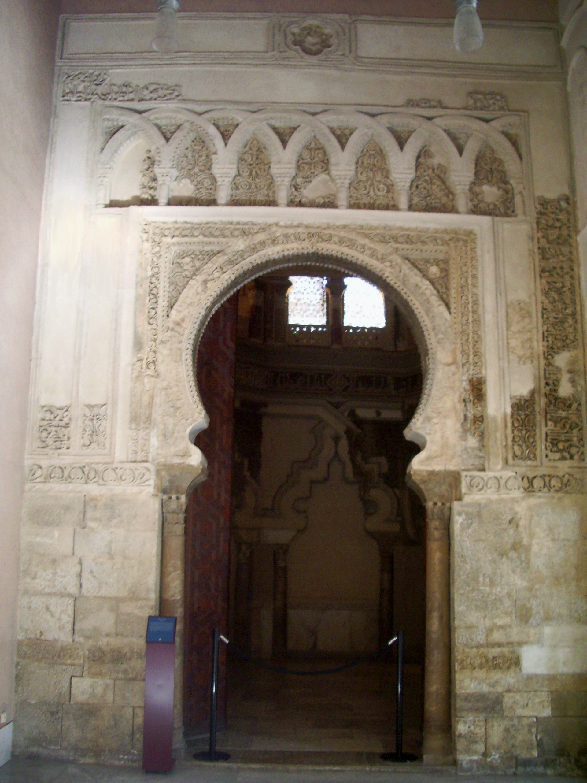 Portada de la mezquita de la aljaferia